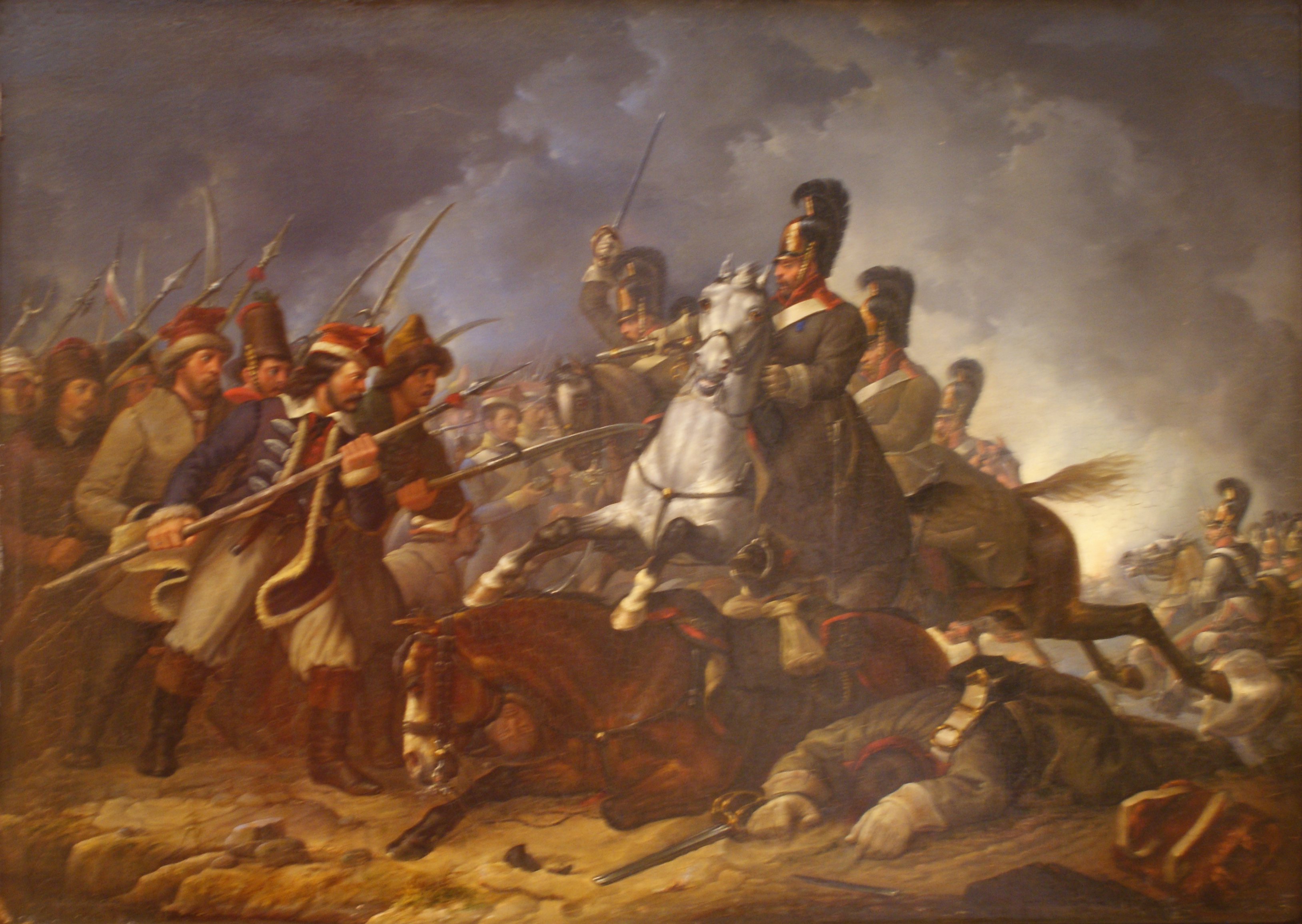 Атака кірасіраў. Дрэва, алей